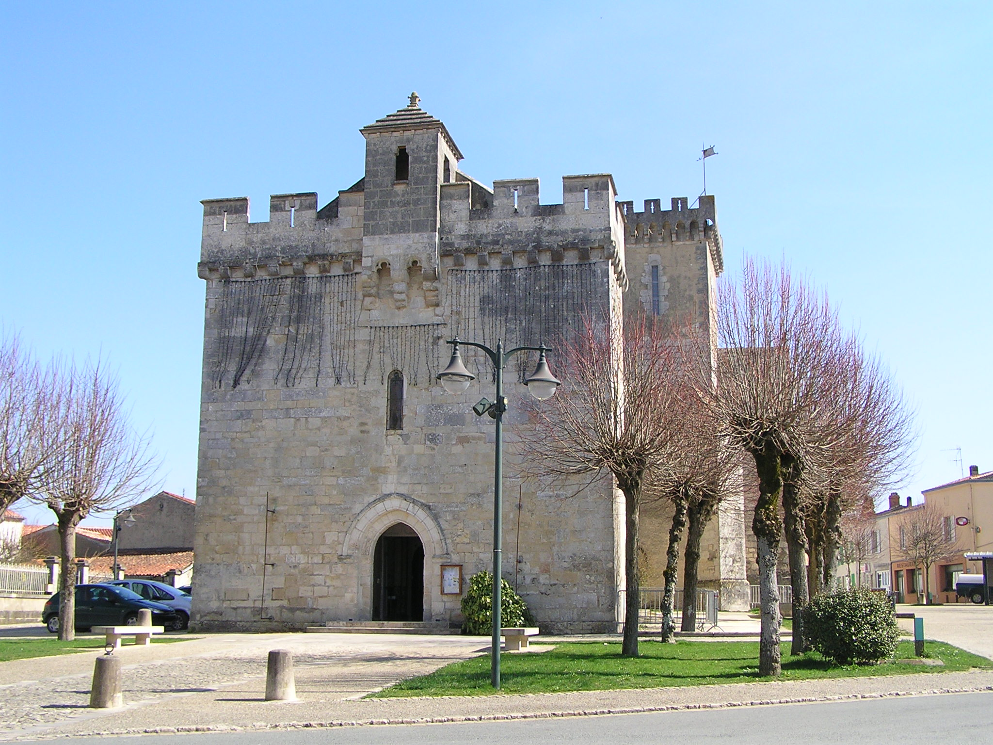 Église fortifiée de Courçon en Charente-Maritime (France)